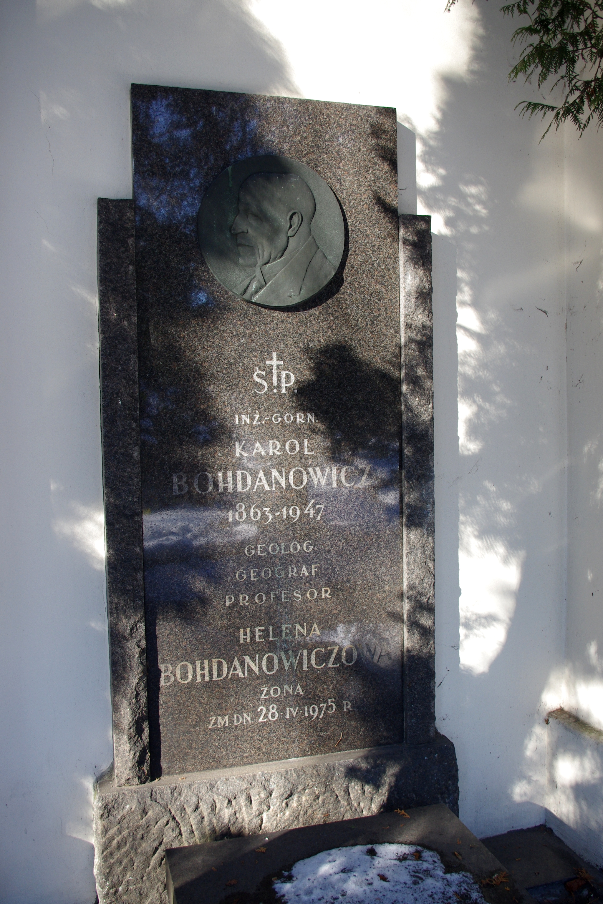 Grób geologa Karola Bohdanowicza w Alei Zasłużonych na Cmentarzu Powązkowskim w Warszawie